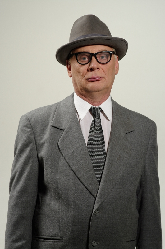 Aivar Tommingas lavastuses 'Minu järel, seltsimees'.